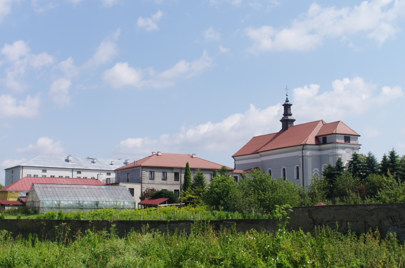 Rawa Mazowiecka, zespół klasztorny augustianów, ob. oo pasjonistów, 1790